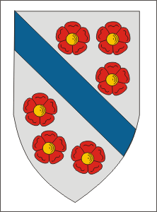 Blasó de Roger de Belfort i els Rosiers, per J. Ollé.